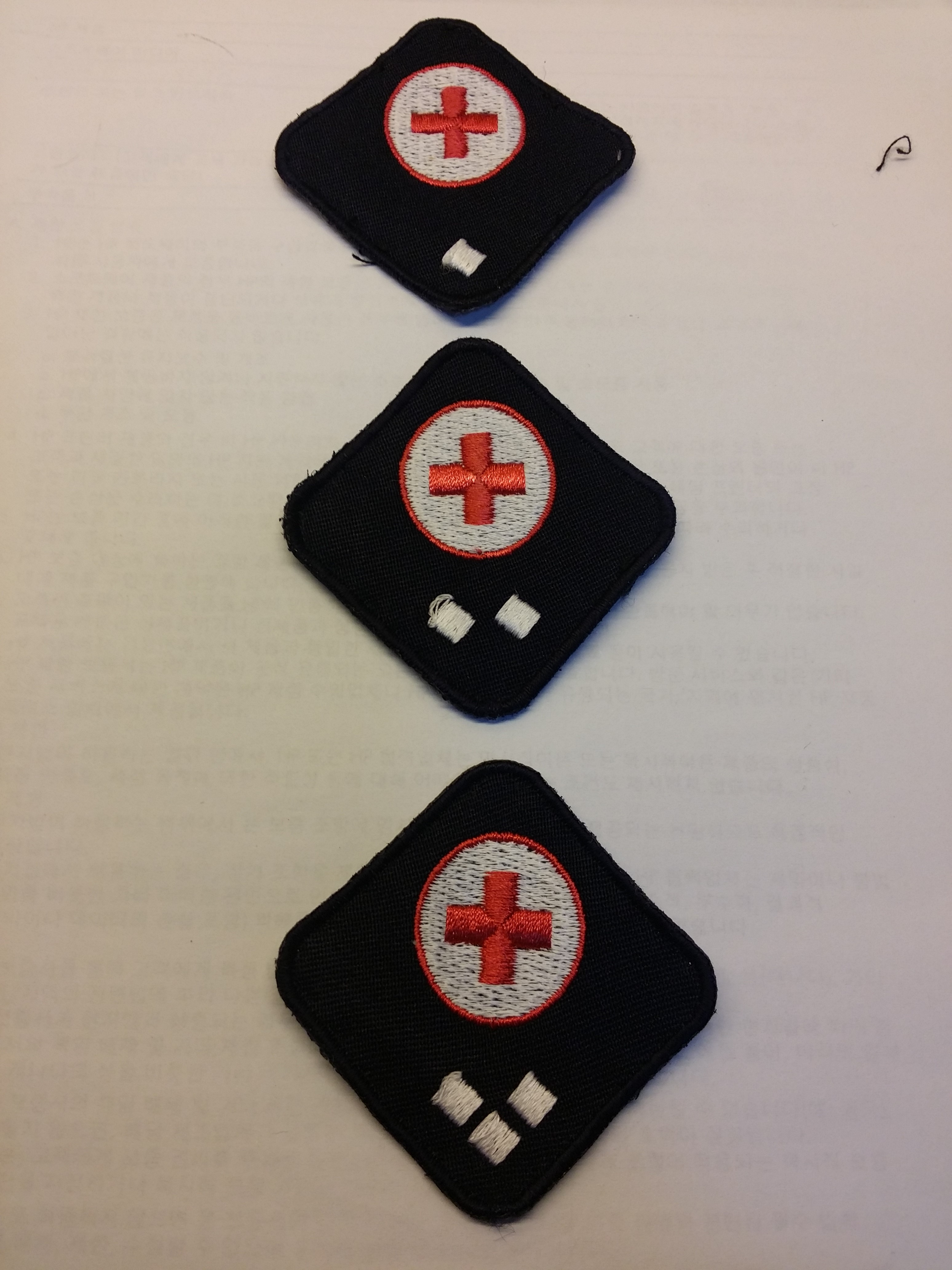 其中三個階段專章，從左至右依次為認知章、實踐章及領袖章。